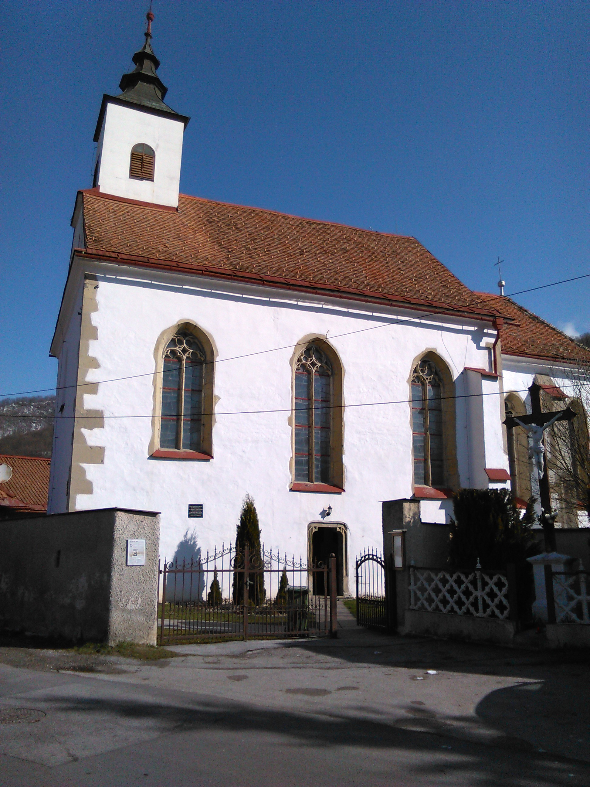 Južný pohľad